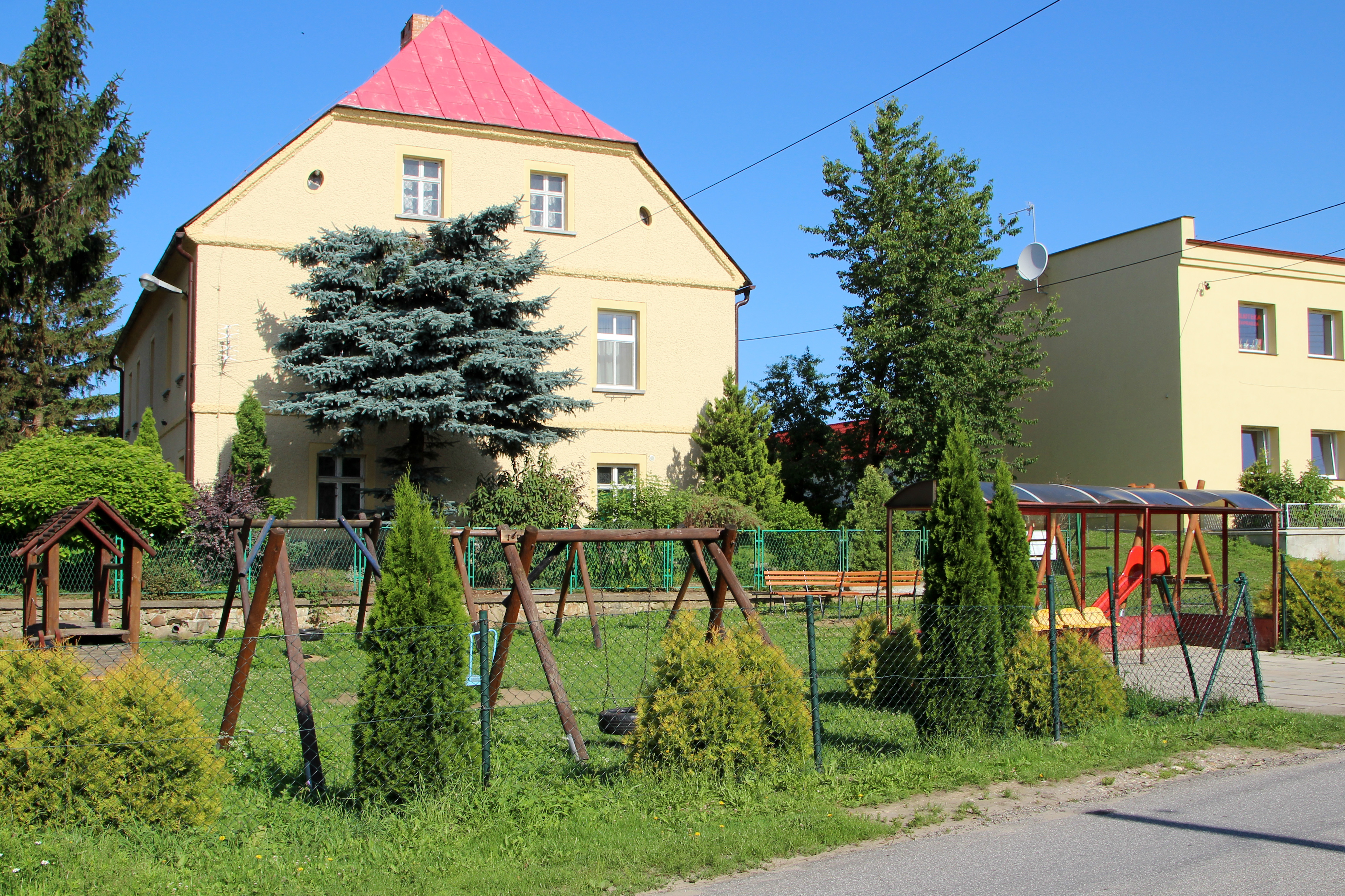 Wierzbięcice - wieś w Polsce w opolskim, w powiecie nyskim, w gminie Nysa.